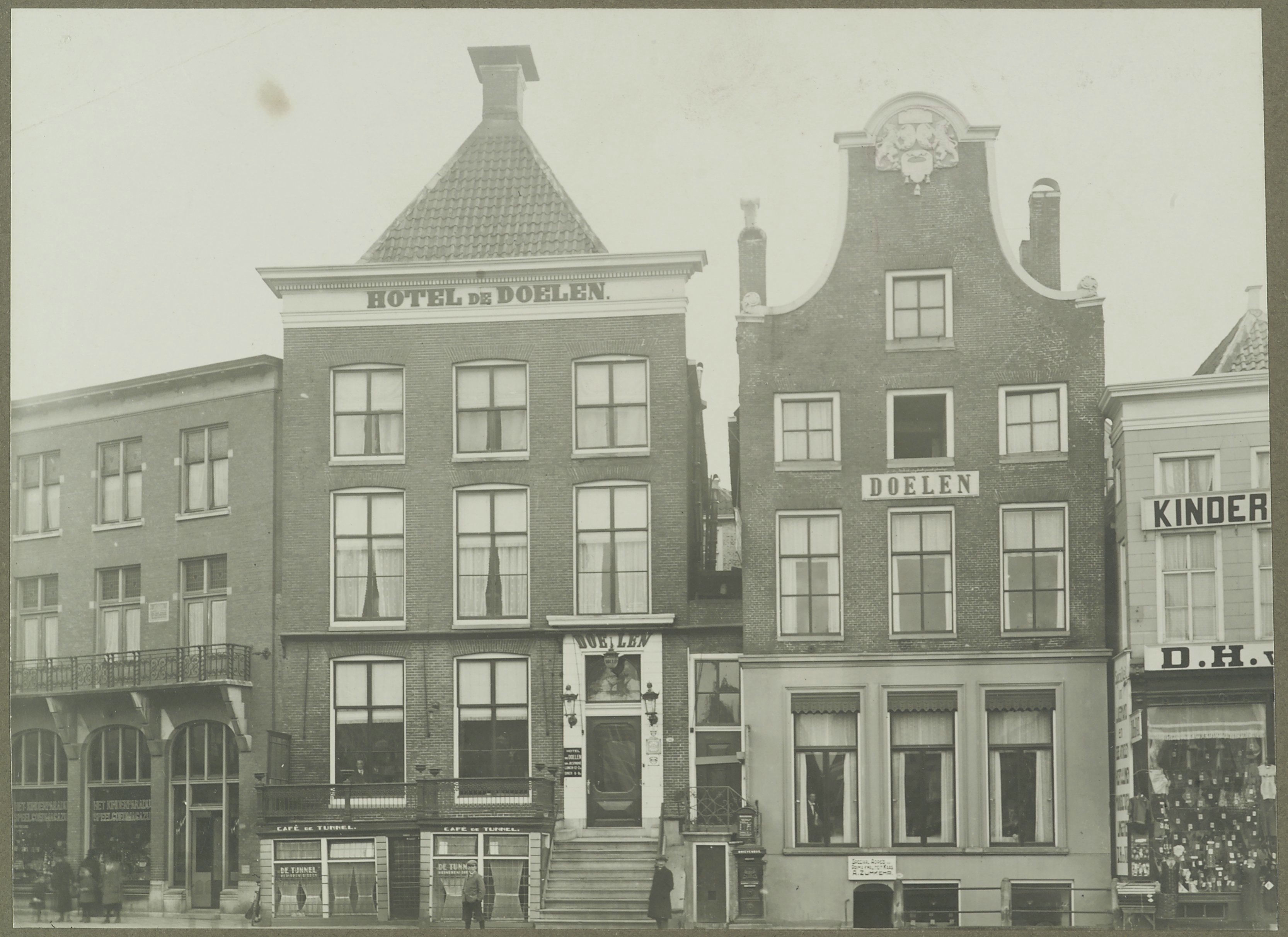 Groningen, Grote Markt 36 (Hotel de Doelen), voorgevels